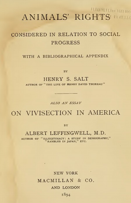 שער הספר של הנרי סולט 'זכויות בעלי חיים'